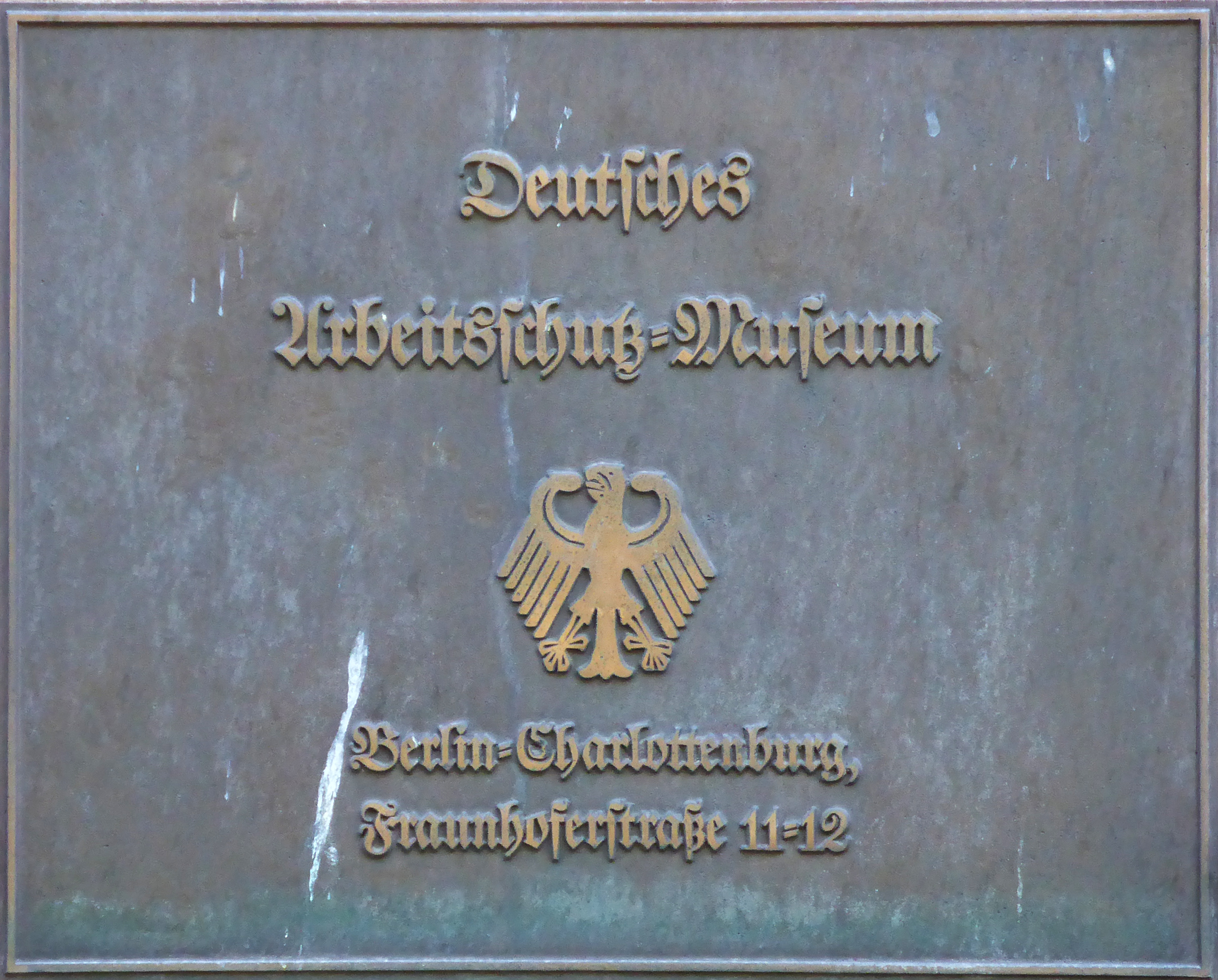 Bronzeschild Deutsches Arbeitsschutz-Museum an der Fassade des Deutschen Technikmuseum Berlin. Wikipedianische KulTour am 10. Oktober 2015 in der Ausstellung des Museums.